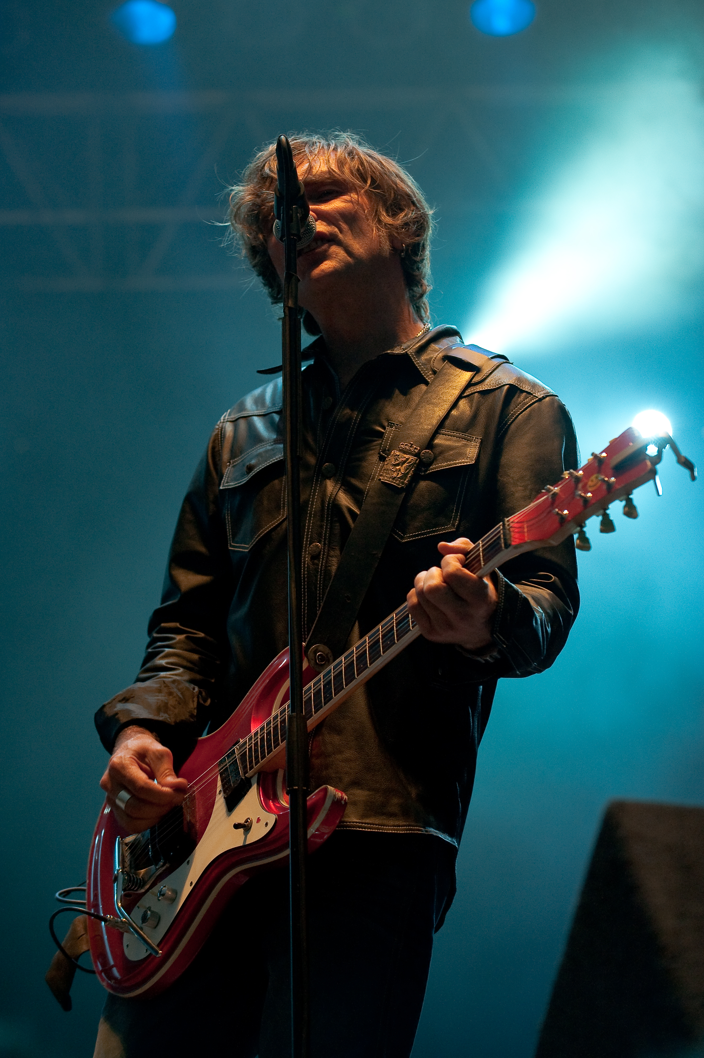 DumDum Boys